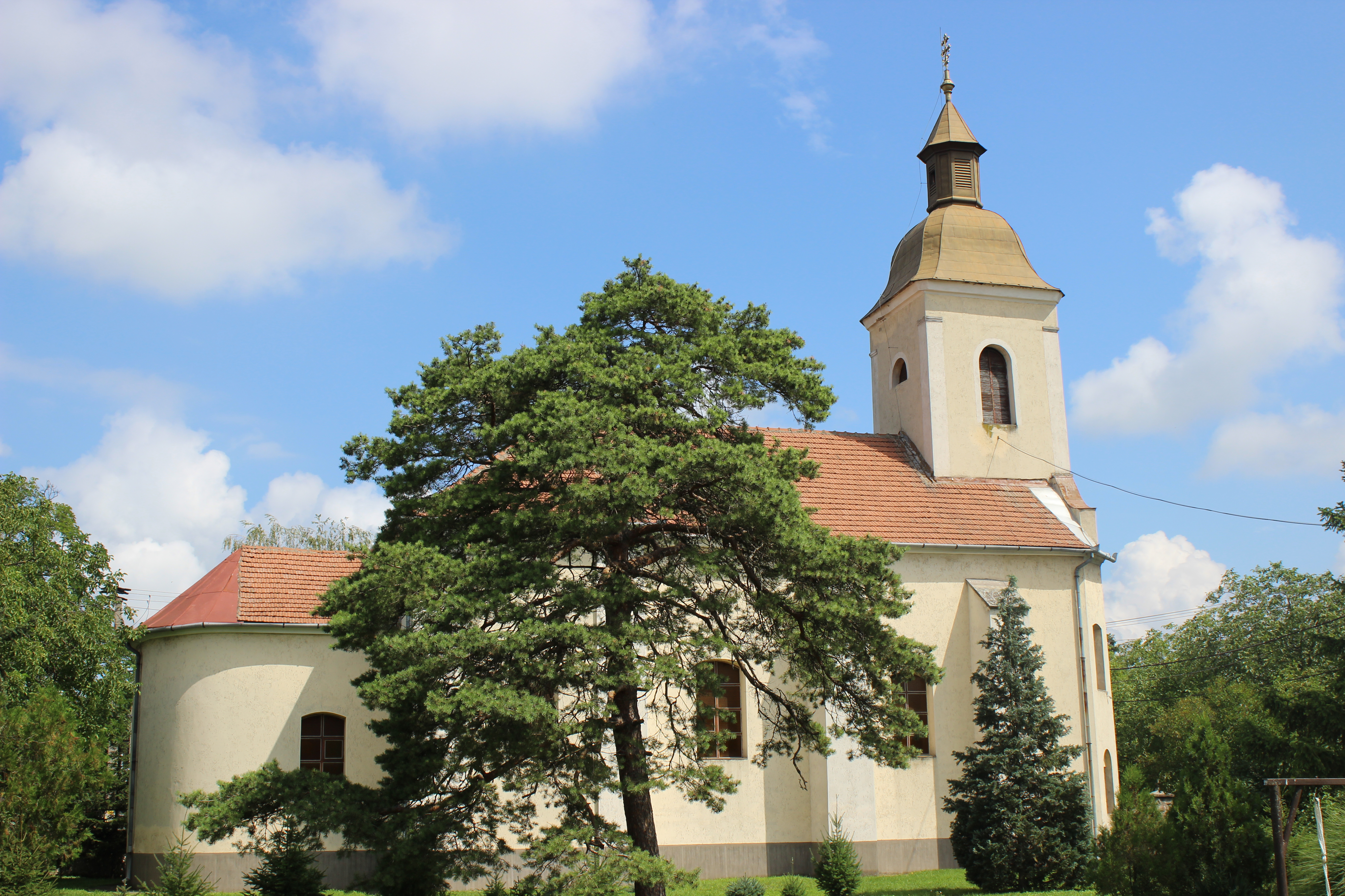 3881 Abaújszántó, Rákóczi u. 100.